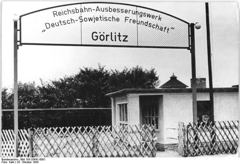 Görlitz, Reichsbahn-Ausbesserungswerk Zentralbild Kahl 1Motiv 25.10.1955 Zur Vorbereitung des Monats der Deutsch-Soejetischen Freundschaft RAW Schlauroth erhielt den Namen "RAW Deutsch-Sowjetische Freundschaft" Das Reichsbahnausbesserungswerk Schlauroth im Kreis Görlitz wurde kürzlich in "RAW Deutsch-Sowjetische Freundschaft" umbenannt. 97 Prozent der Belegschaft gehörenderGesellschaft für Deutsch-Sowjetische Freundschaft an.Die Werktätigen dieses Reichsbahnbetriebes haben sich das Ziel gesetzt, im kommenden Freundschaftsmonat auch den letzten Angehörigen des Werkes für die Gesellschaft zu gewinnen und darüber hinaus,auch ausserhalb des RAW Mitglieder zu werben. UBz: Am Tor des RAW prangt der neue, verpflichtende Name.